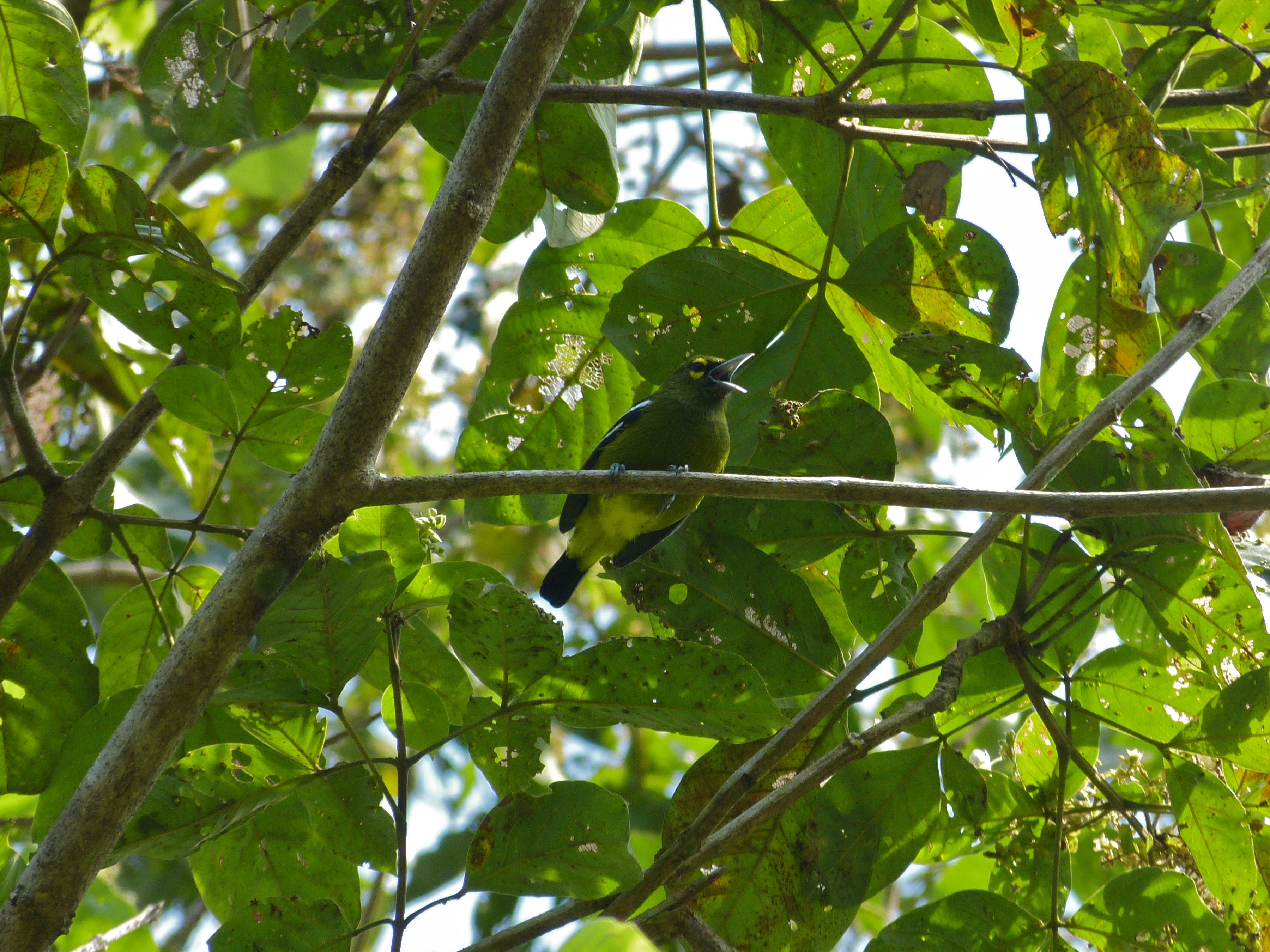 Bilit, Sabah, MALAYSIA